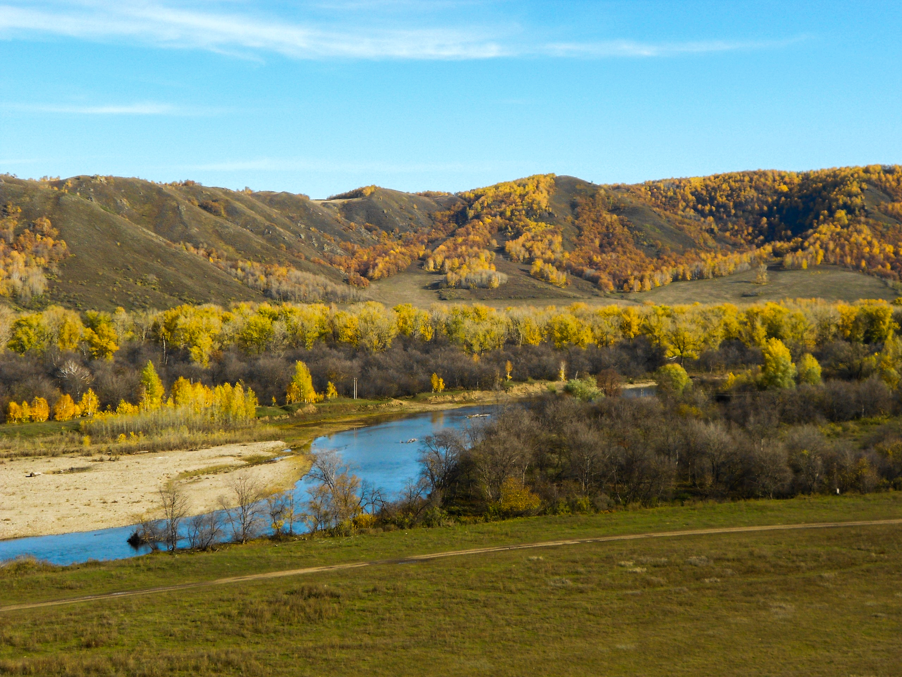 Шайтантау заказник, Хайбуллинский район This image is related to the protected area of Russia number 0210231